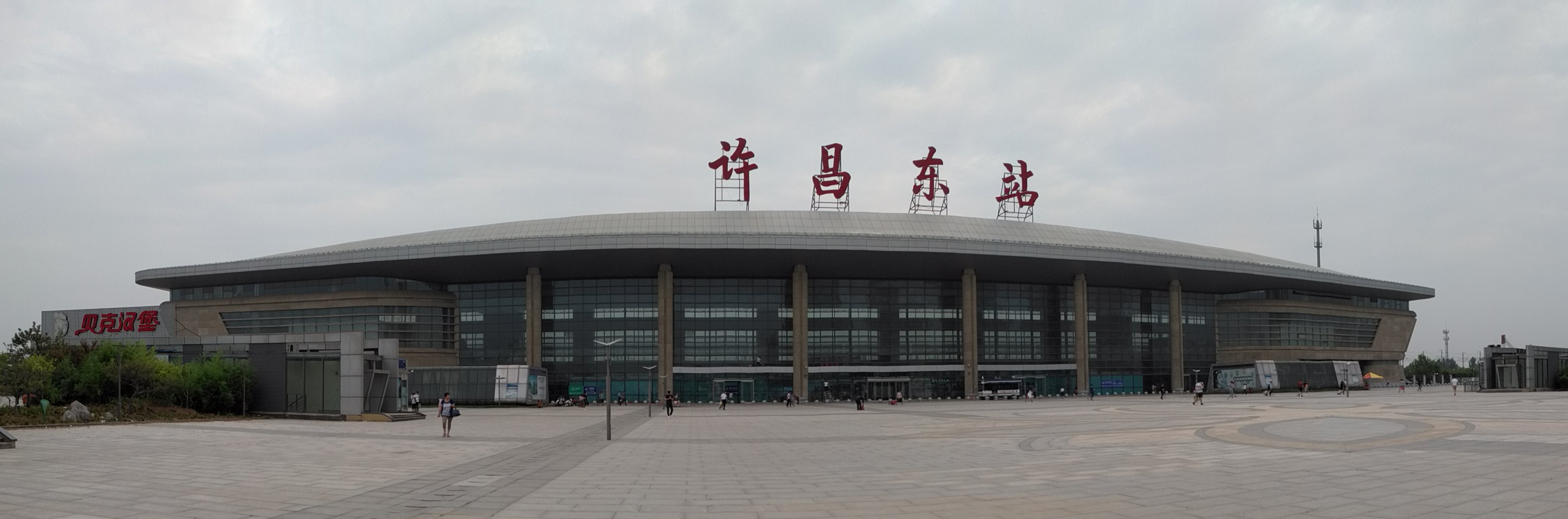 京广高铁许昌东站广场全景